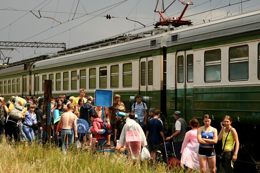 Туристы едут на Грушинский фестиваль авторской песни, Россия